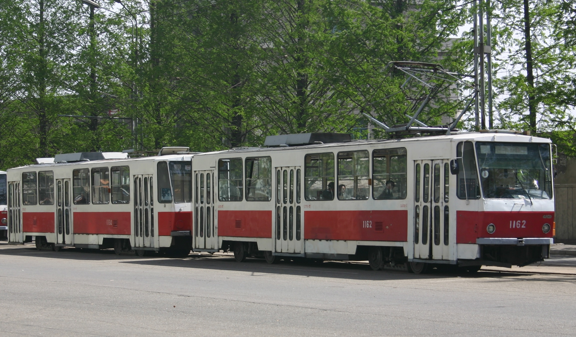 Tram Pyongyang, DPRK.